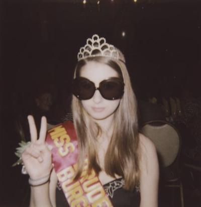 Miss Burgenland 2007